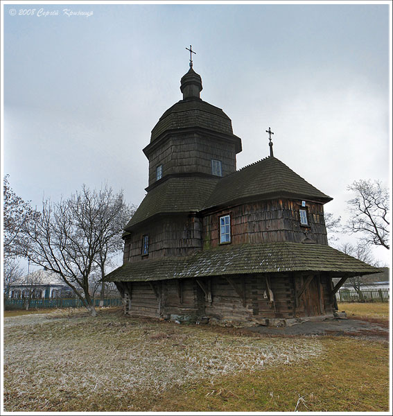 Драбівці01.jpg: Троїцька церква